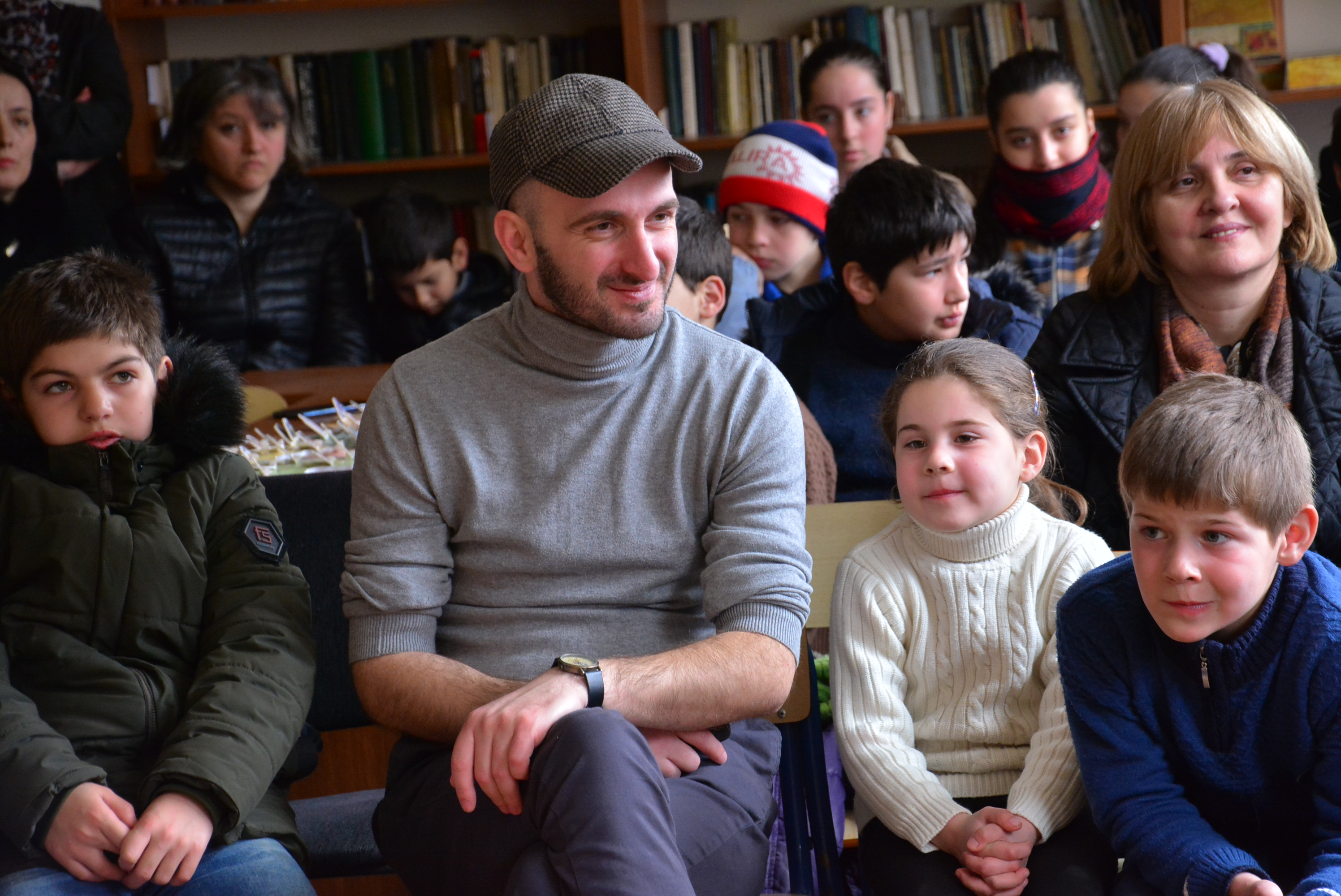 გიორგი კეკელიძე